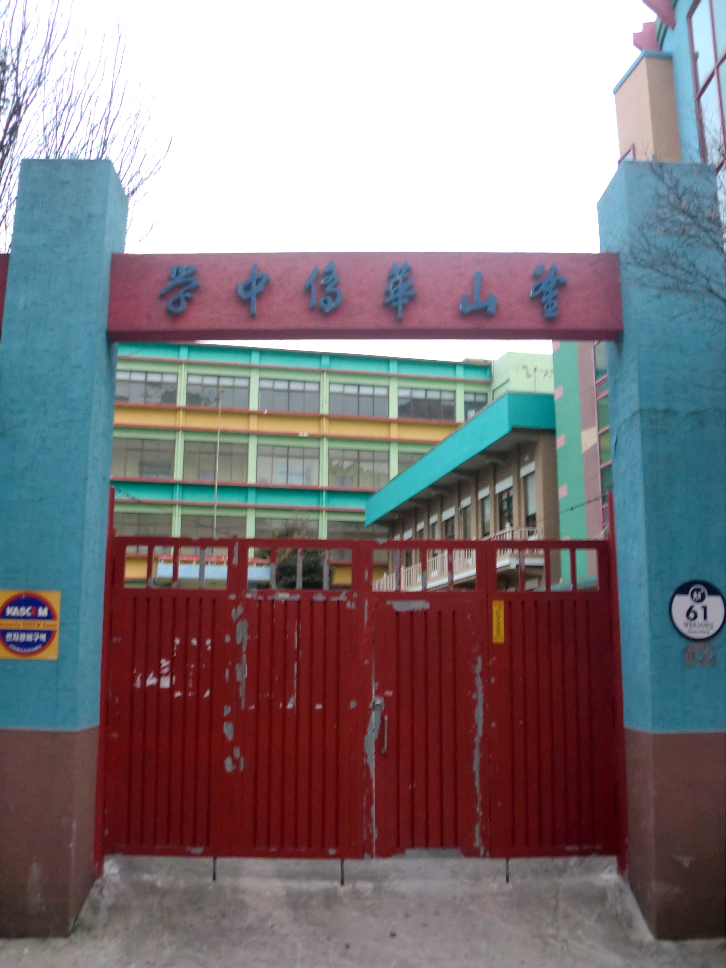 부산광역시 동구에 있는 부산화교중학교